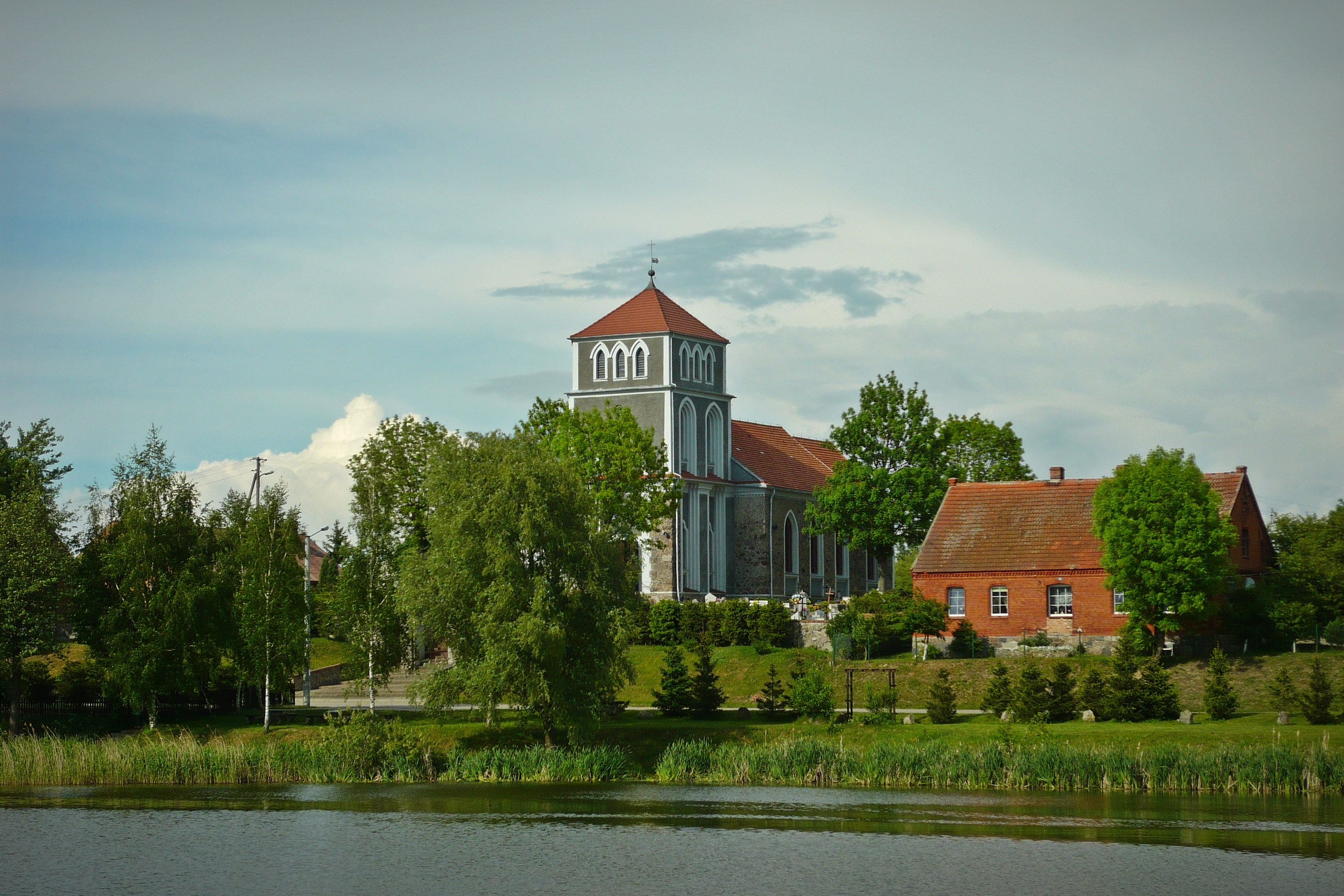 Przysiersk, ul. Szkolna 7 - rzymskokatolicki kościół parafialny p.w. św. Wawrzyńca.